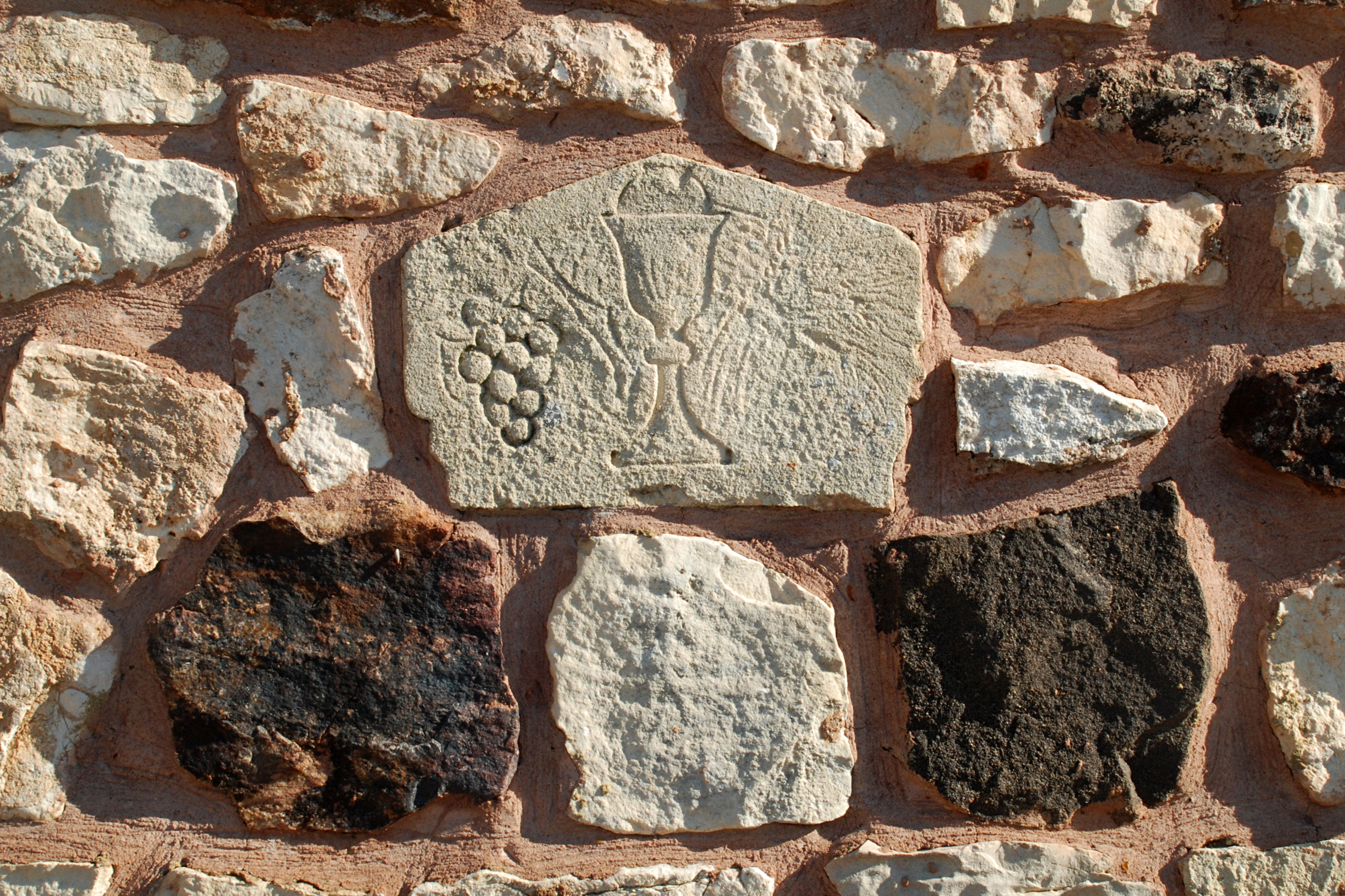 France - Gard - Chapelle Saint-Privat de Pouzilhac